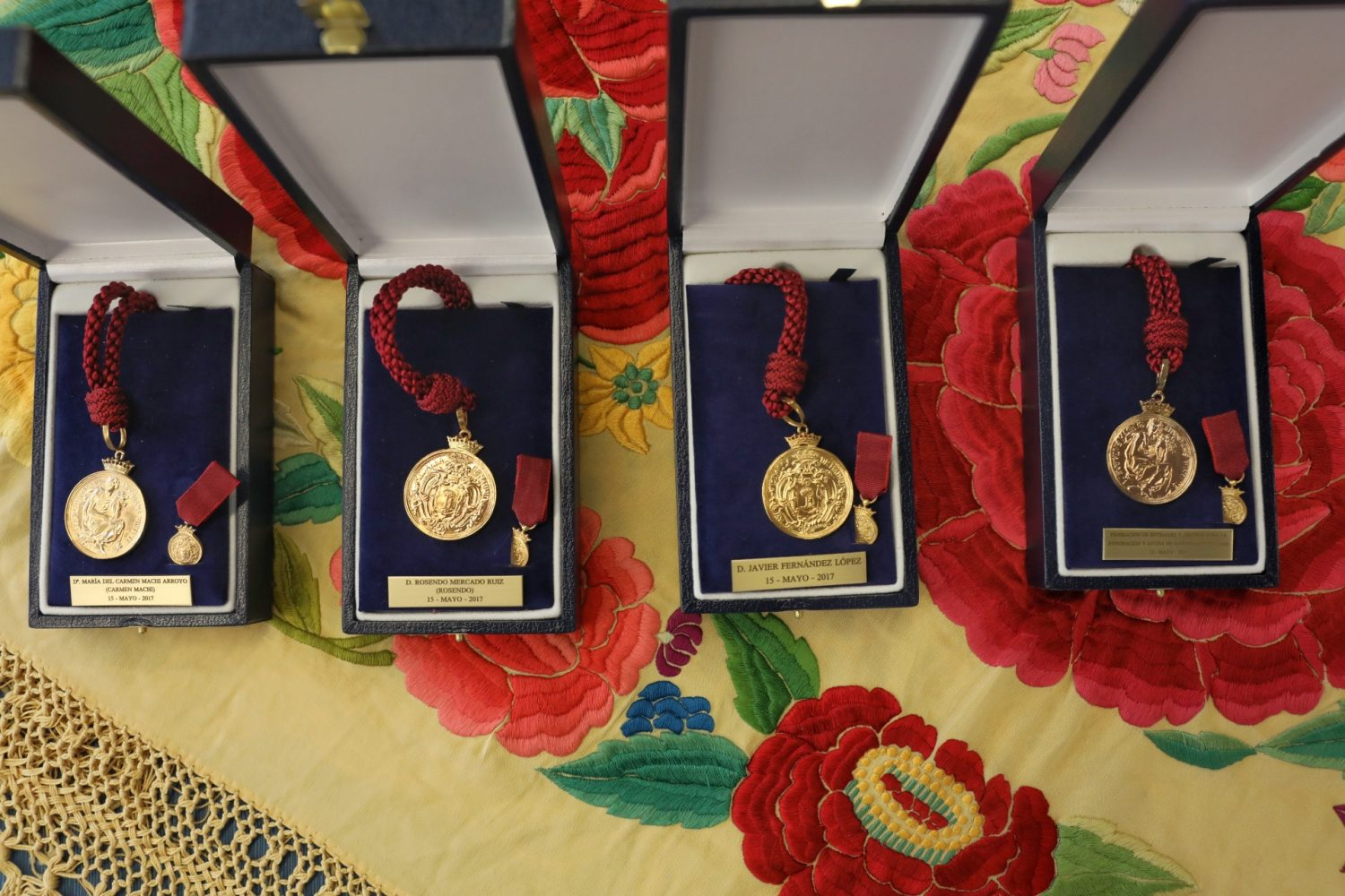 Medallas de Madrid 2017